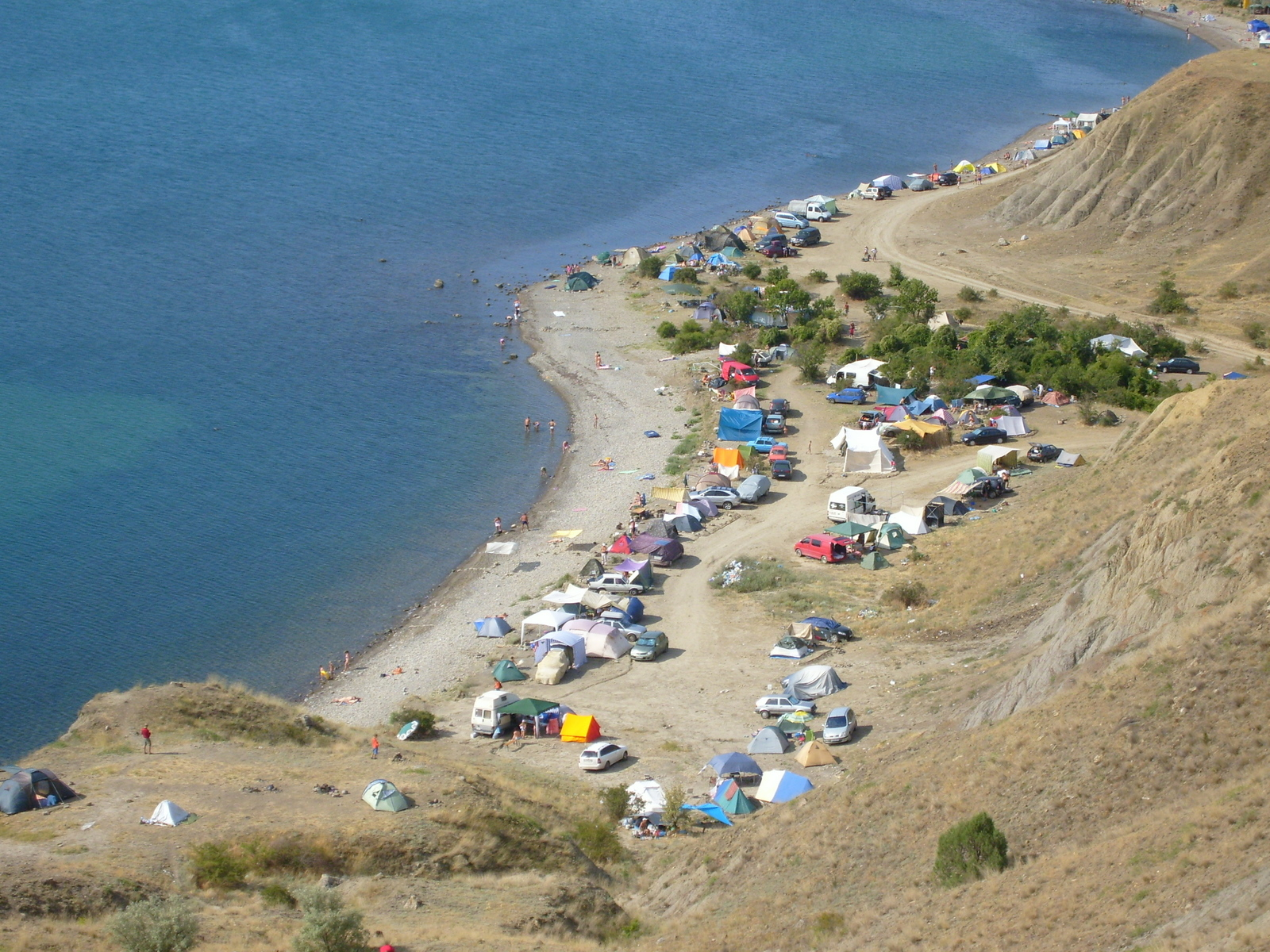 Курортное. Дикий город в Лисьей бухте. 12/08/2009г.